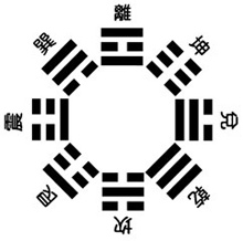 Houtian-Anordnung ("Nach-Himmel") der Acht Trigramme